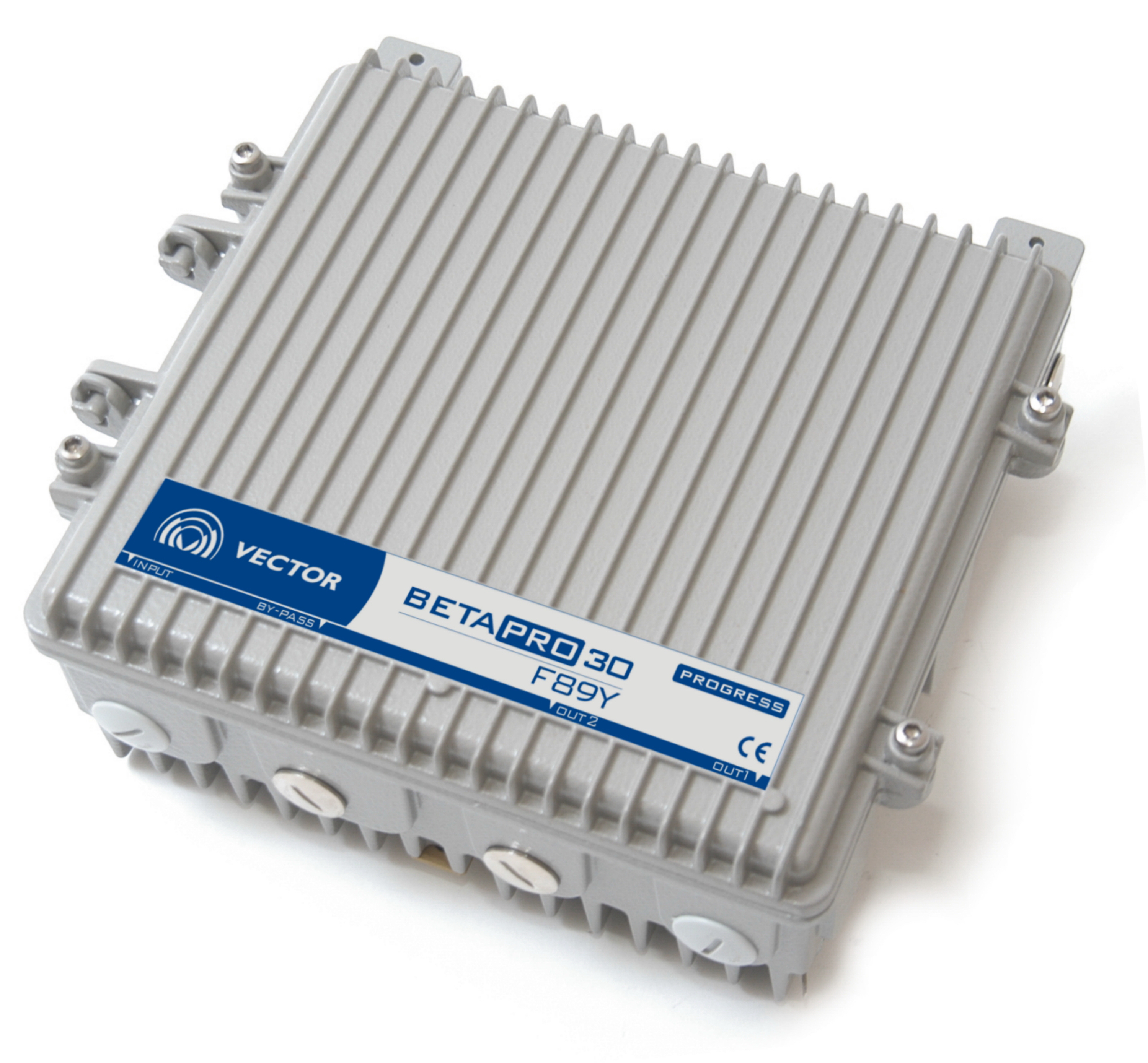 Wzmacniacz Dystrybucyjny stosowany w sieciach HFC